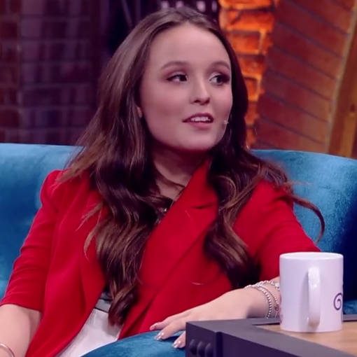 Não é de hoje que se comenta que a Larissa Manoela e a Maísa Silva tem alguma briga, viu? Pois muito que bem, a atriz do SBT resolveu por um ponto final nas especulações!